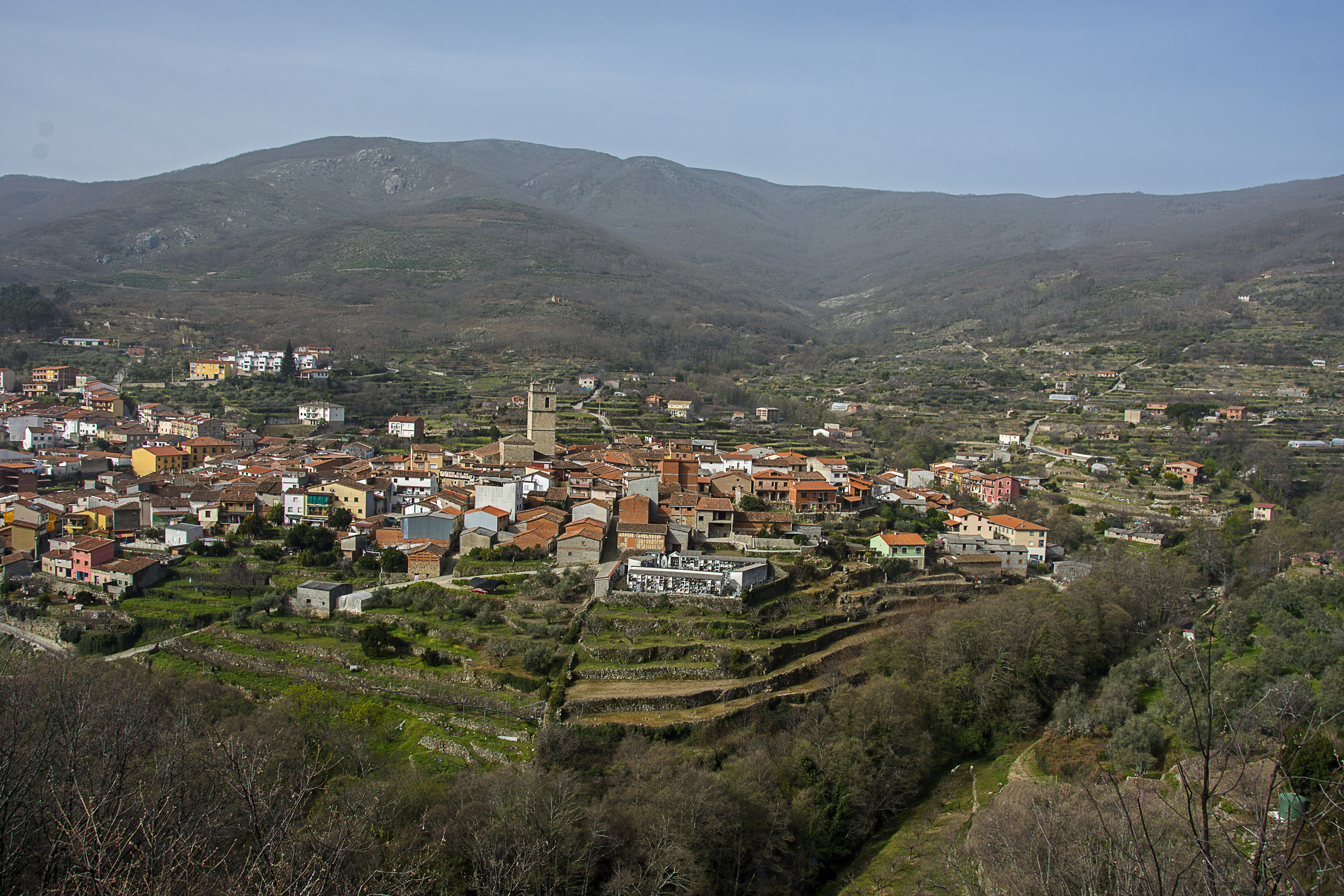 Vista del municipio de Garganta la Olla